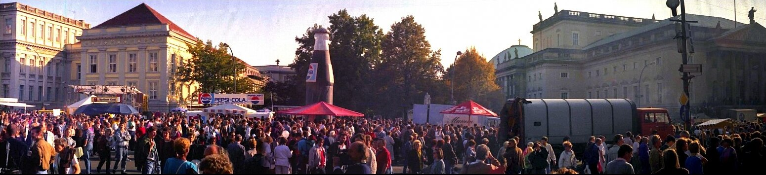 Un mercredi 3 octobre, en début d'après-midi, un assemblage de 4 photos pour donner ce panoramique